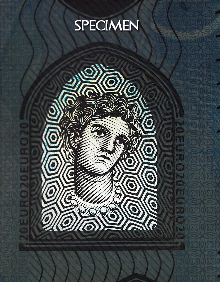 Fotografía de aproximación a detalles de seguridad de billete de veinte €, holografía.